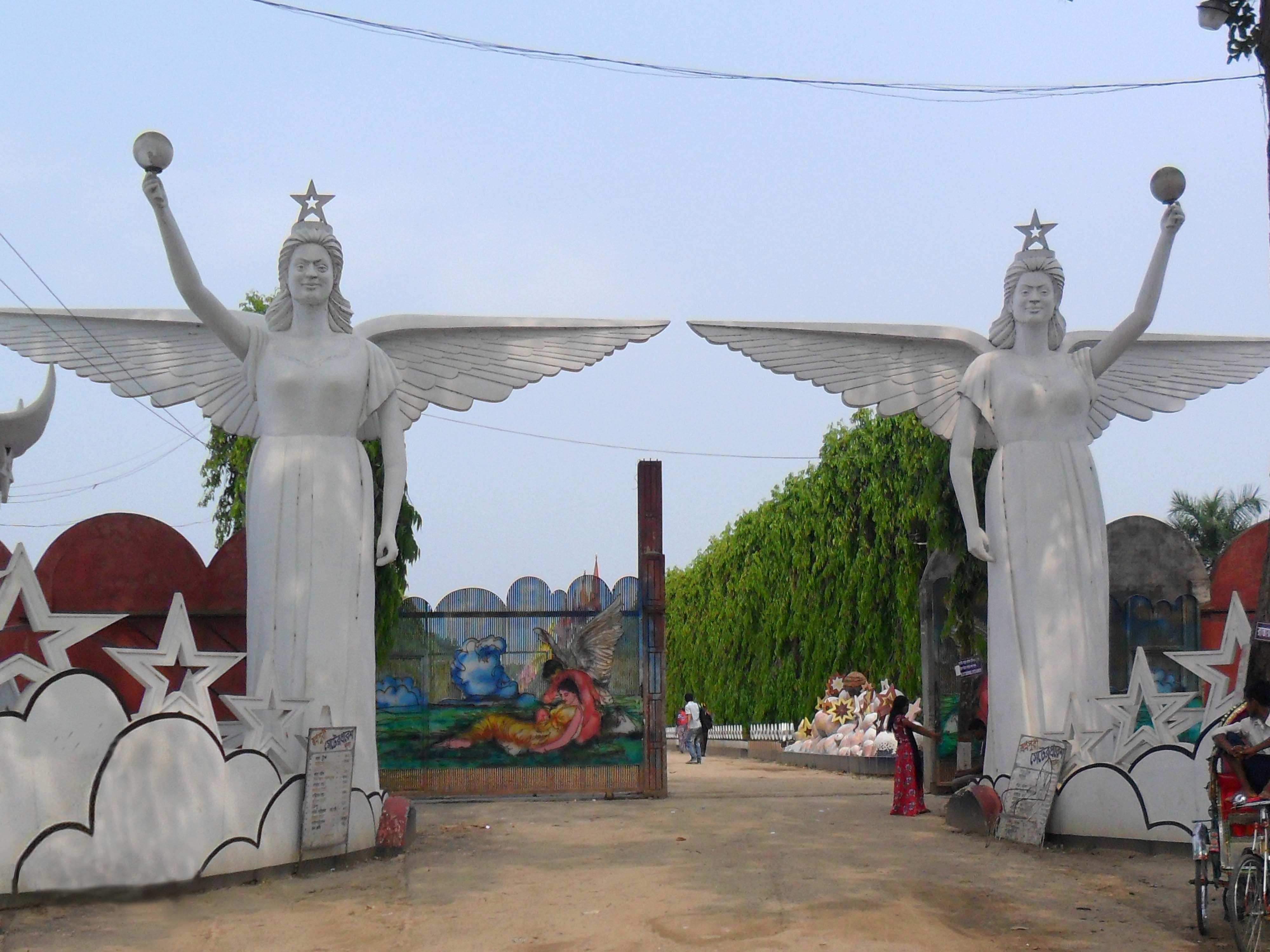 ছবিটি দিনাজপুরের স্বপ্নপুর পার্ক থেকে ১লা মে ২০১২ তারিখে ক্যামেরা বন্দী করা। ছবিটিতে যে দৃশ্যটি দেখতে পাচ্ছি সেটা দিনাজপুরের স্বপ্নপুর পার্কের প্রবেশ দ্বার বা প্রধান ফটক। এখানে লোহার পাতের কারুকার্য ও রংঙ্গের ব্যবহার দ্বারা প্রেমময় রোমান্টিক দৃশ্যকে ফুটিয়ে তোলা হয়েছে। এবং কংক্রিট দ্বারা তৈরি করা হয়েছে প্রবেশ দ্বারের দু'পাশে দুটি পরী। যা স্বপ্নপুরপার্কে প্রবেশের সময়ই হৃদয় কেড়েনেই দর্শনার্থীদের। জাগিয়ে তোলে অন্তরের অন্তস্থল থেকে কৌতুল, ভেতরে না জানি আরো কত কী আছে?